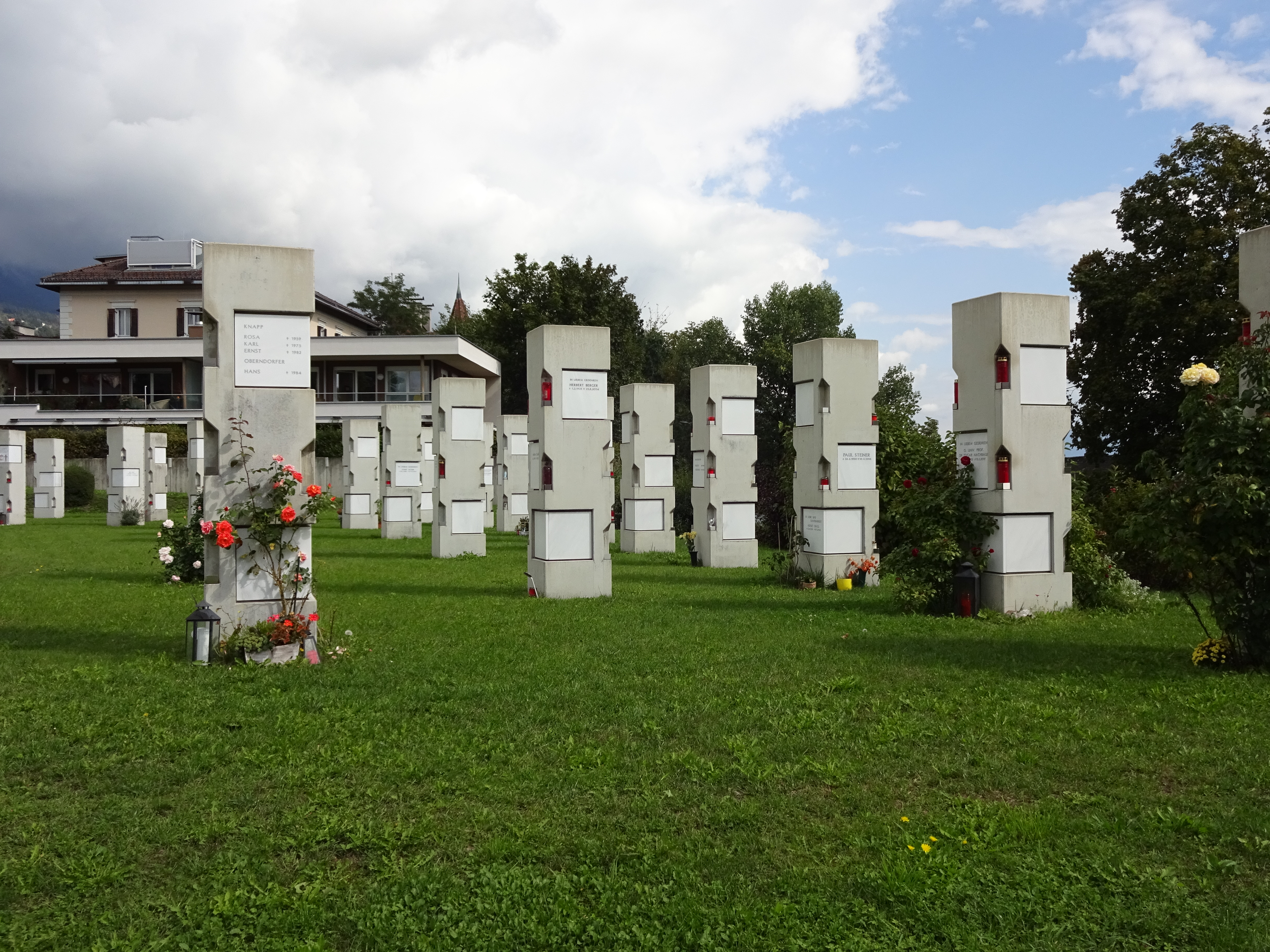 Tiroler Landesfriedhof Mariahilf, Urnenhain This media shows the remarkable cultural object in the Austrian state of Tyrol listed by the Tyrolean Art Cadastre with the ID 83557. (on tirisMaps, pdf, more images on Commons, Wikidata)